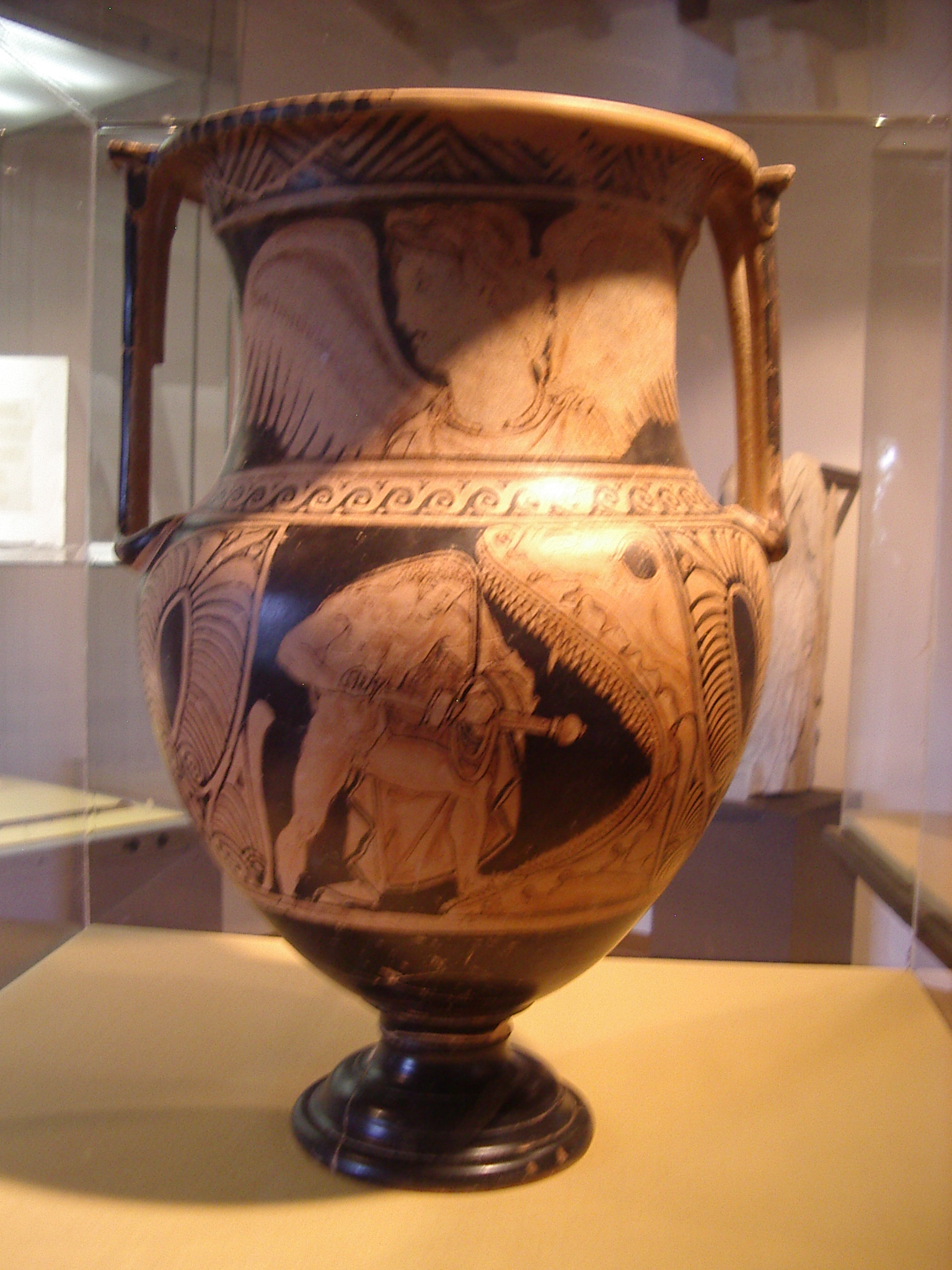 Antiquarrium da la nécropole du Palazzone:Amphore étrusque, Vase de Thislovely du maître d'Hésione, scène:Hercules pose le pied sur la mâchoire inférieure du monstre et se prépare à dégainer son épée